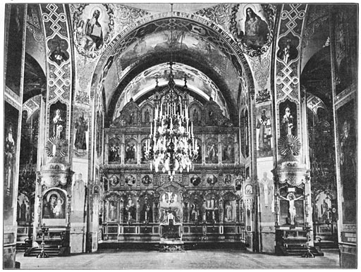 "De hoofdkerk van Walamo van binnen"